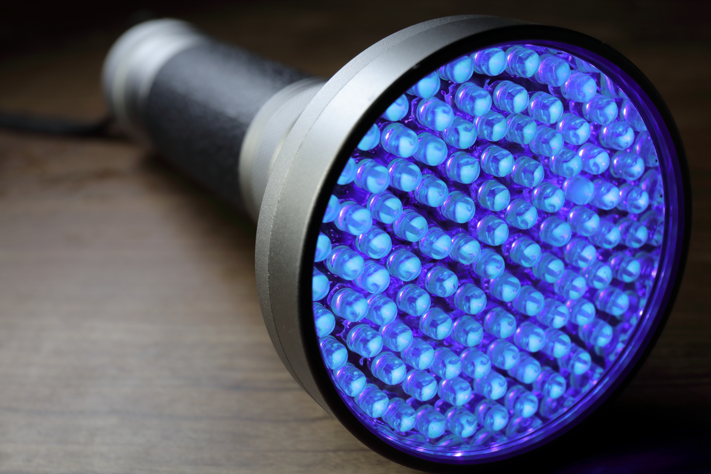 紫外線LEDを使った懐中電灯型のブラックライト